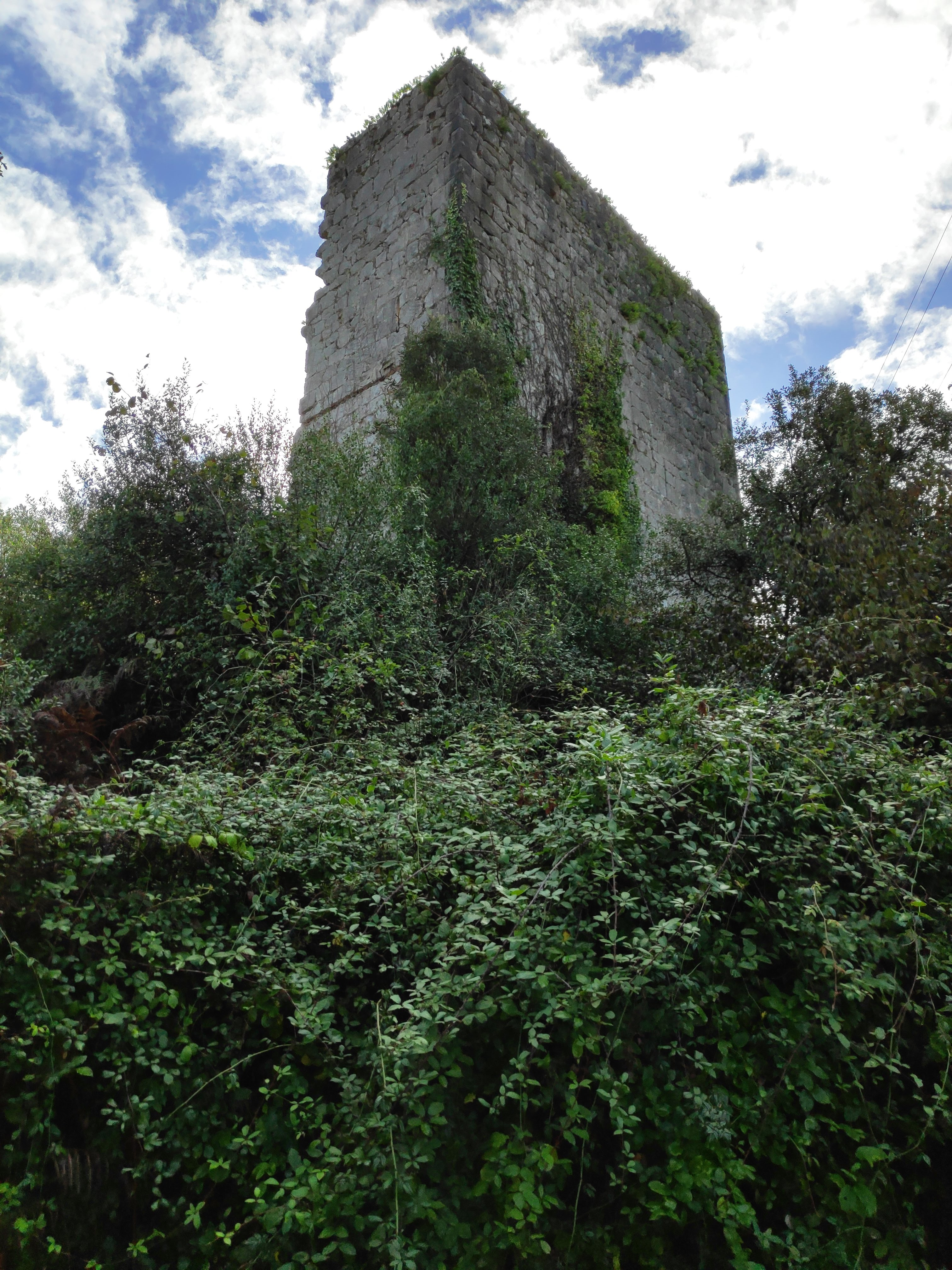 Torre Urdaibai desde fuera